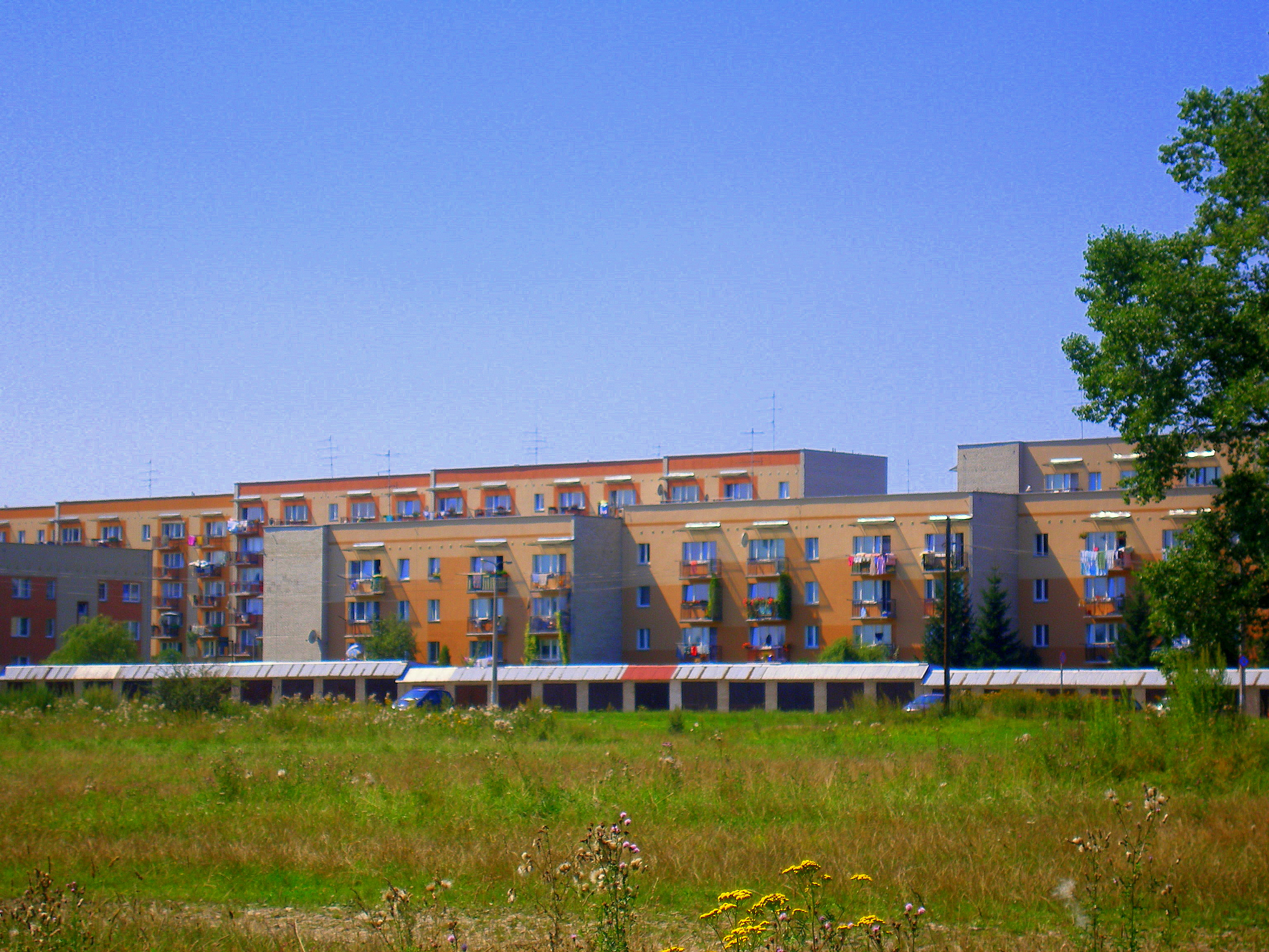 Slovákmi obľúbené juhopoľské mesto Nowy Targ.